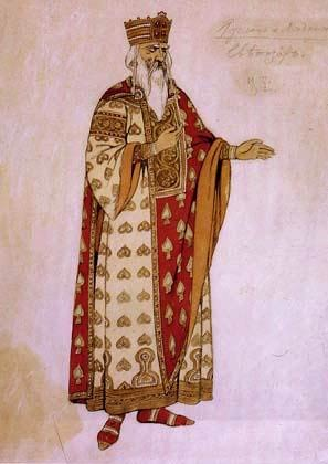 И.Билибин. Эскиз костюма Светозара к опере "Руслан и Людмила"